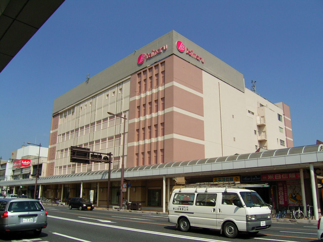 都城市の中心商店街にある都城大丸